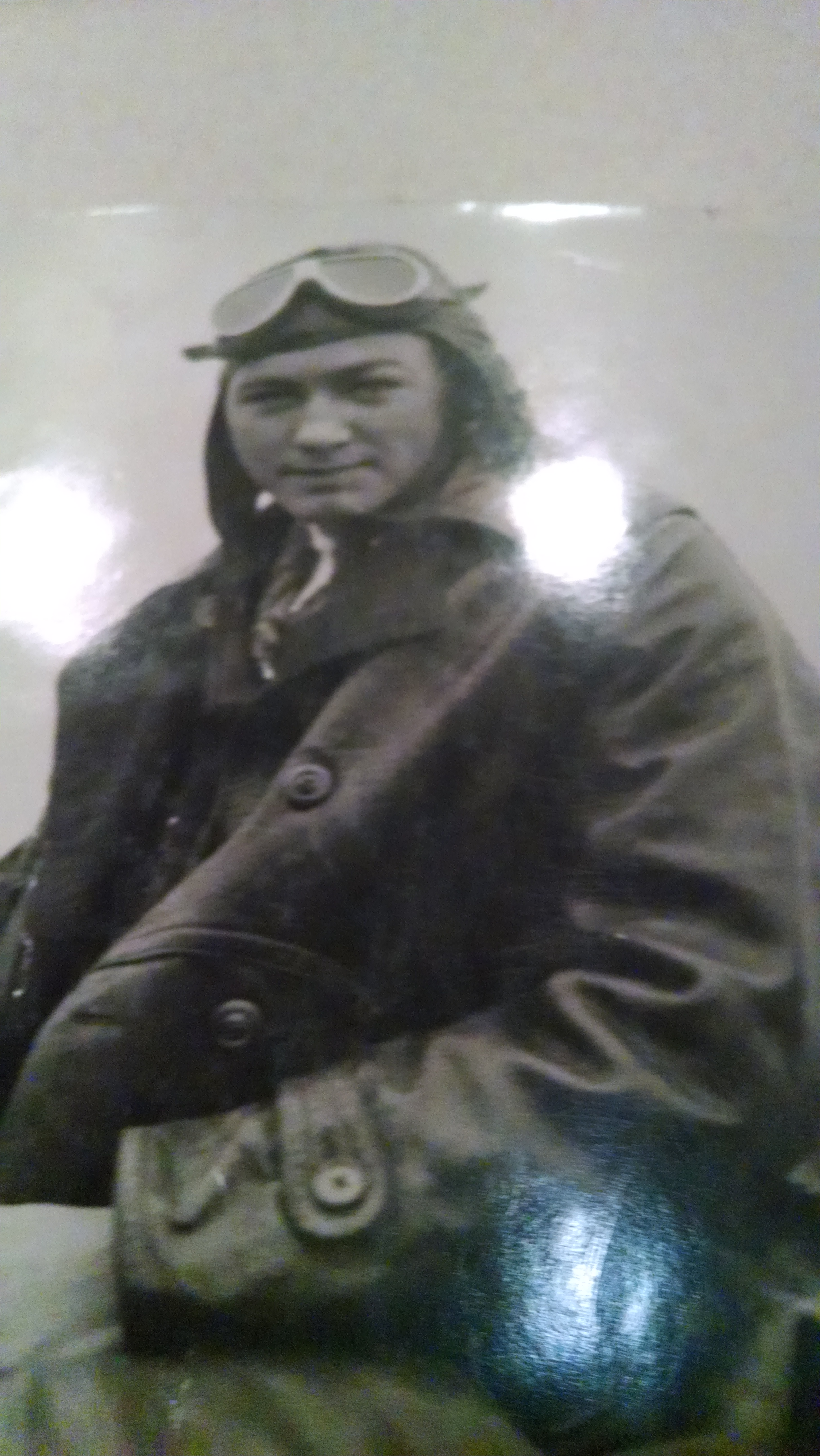 Dick James